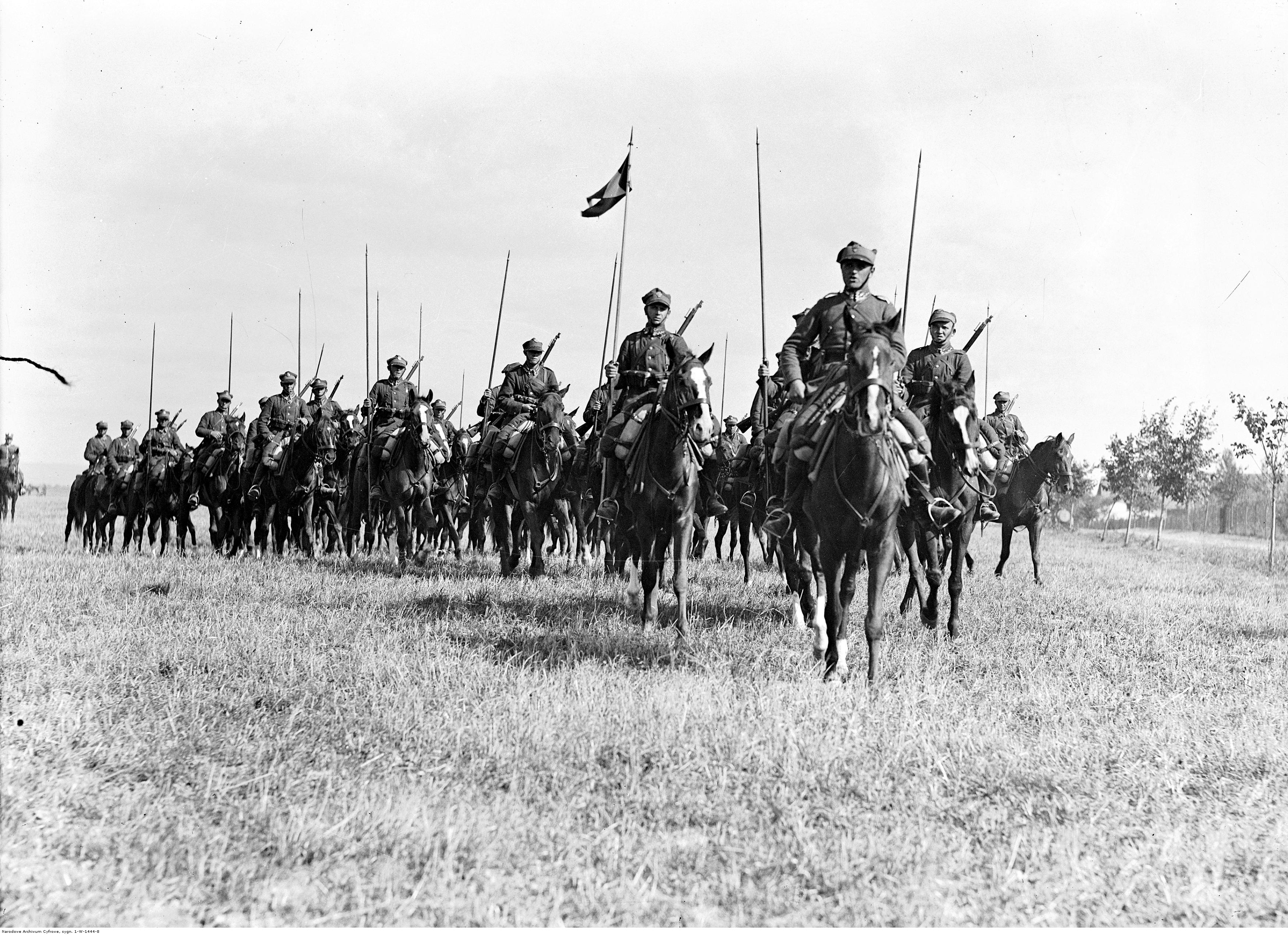 Żołnierze 7. Pułku Ułanów Lubelskich przejeżdżają przez wieś.